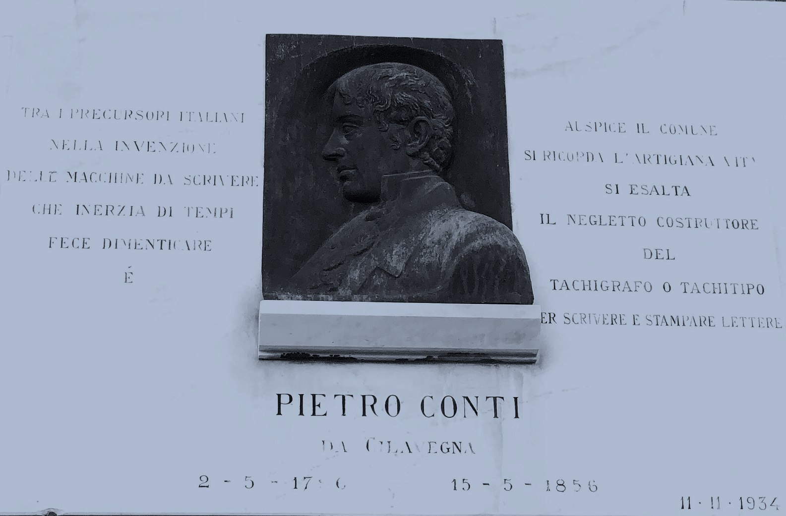 Lapide in onore di Pietro Conti, posta sul torione dell'antico castello